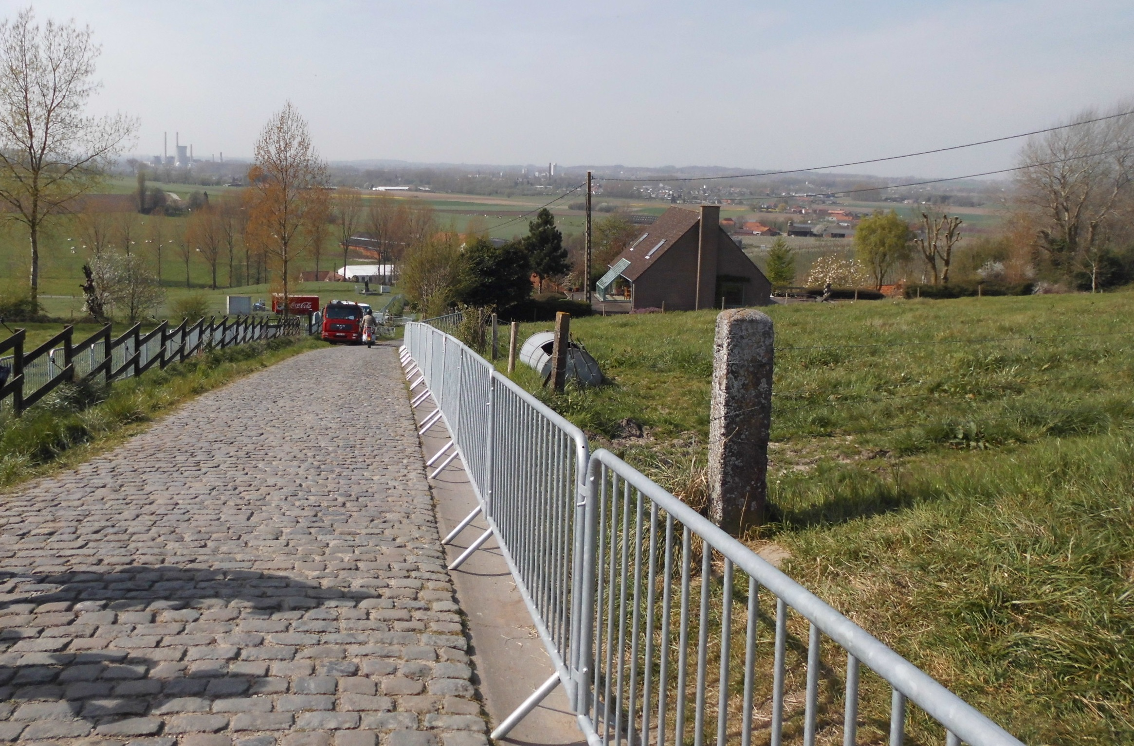 De Paterberg in voorbereiding op de Ronde van Vlaanderen - Paterbergstraat - Kluisbergen - Oost-Vlaanderen - België In de verte links de centrale van Ruien (Kluisbergen).